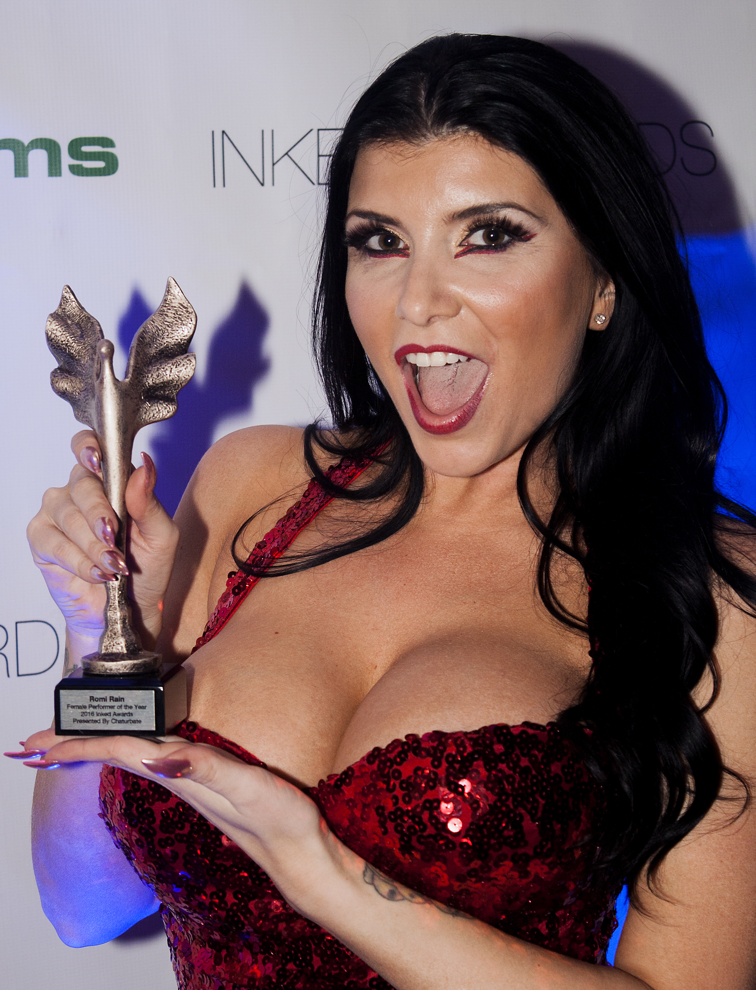 Exxxotica2016_0228bas